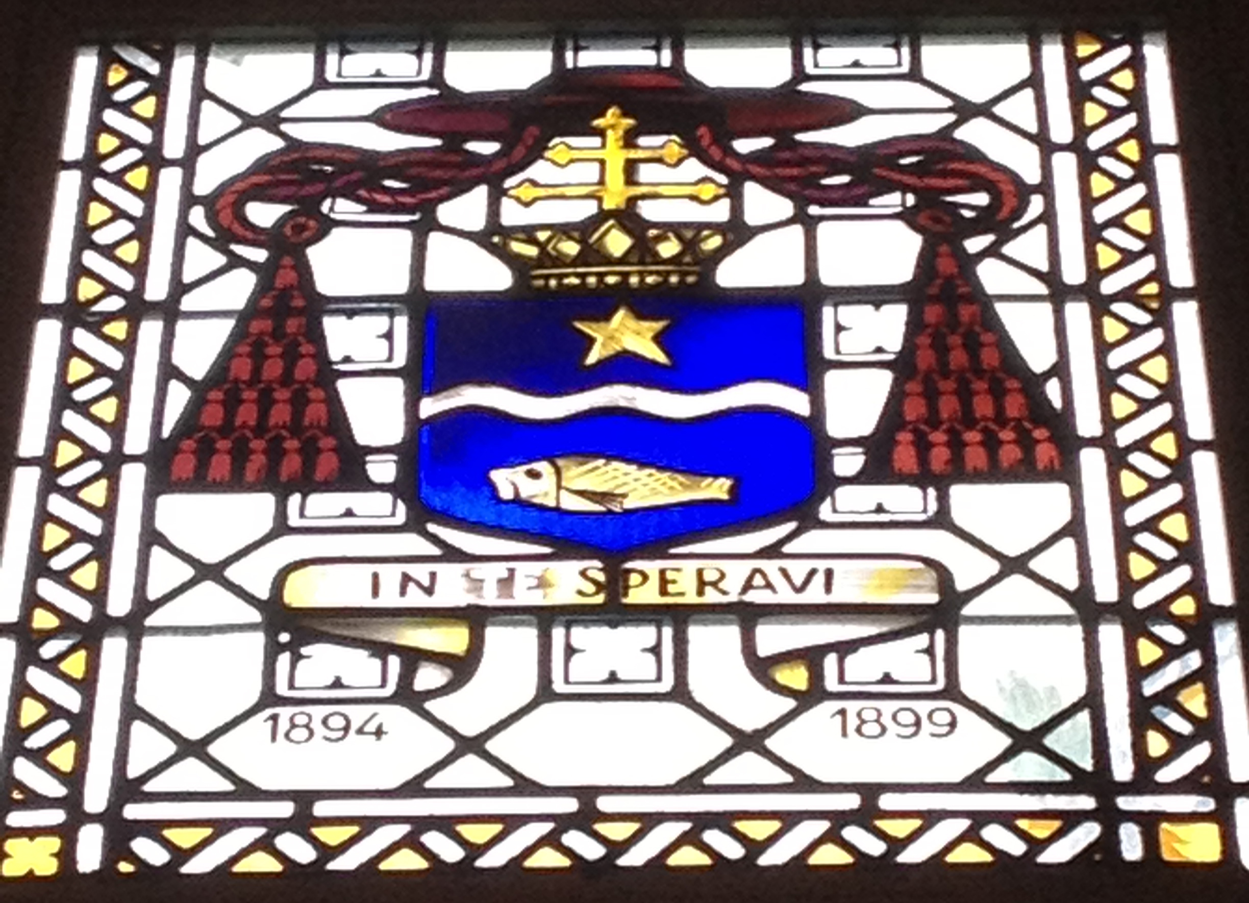 Armoiries en vitrail de Guillaume Marie Romain Sourrieu, dans la salle des États de l'archevêché.